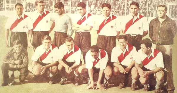 River campeón de 1937. Arriba: Malazzo, Vassini, A. López, Cuello, Bernabé Ferreyra y Moreno. Abajo: Coloccini, Vaschetto, Rodolfo, Pedernera y Peucelle.